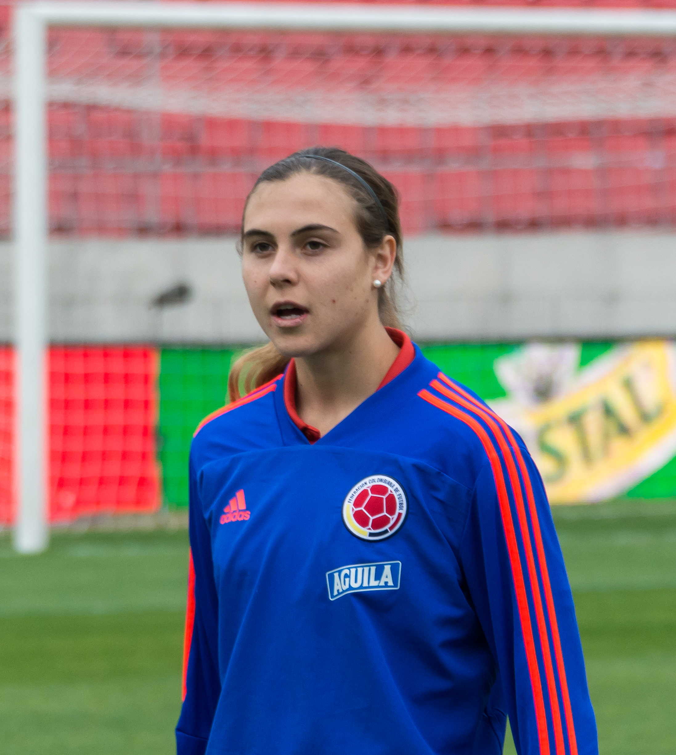 Catalina Pérez Jaramillo, Chile v Colombia, Estadio Nacional, Ñuñoa, Santiago, Chile.